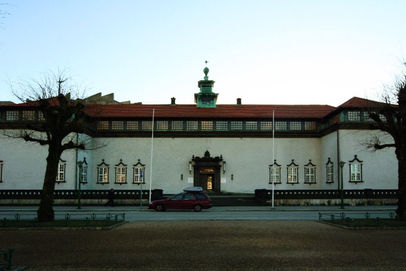 Rasmus Meyers Samlinger foto Nina Aldin Thune